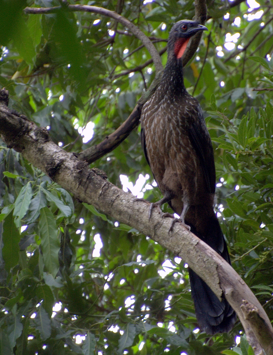 Parque das Fontes, Serra Negra-SP